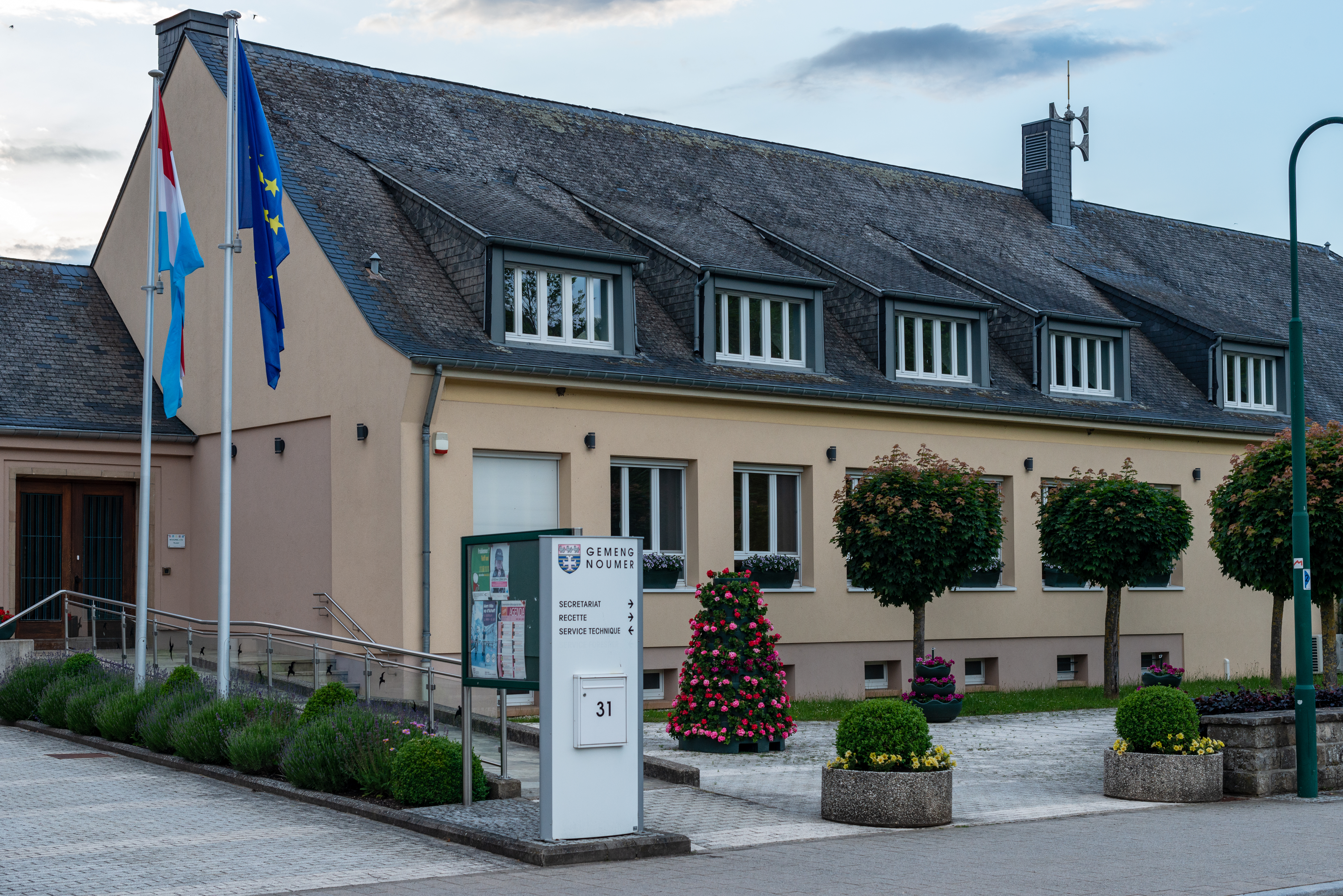 D'Märei zu Noumer.